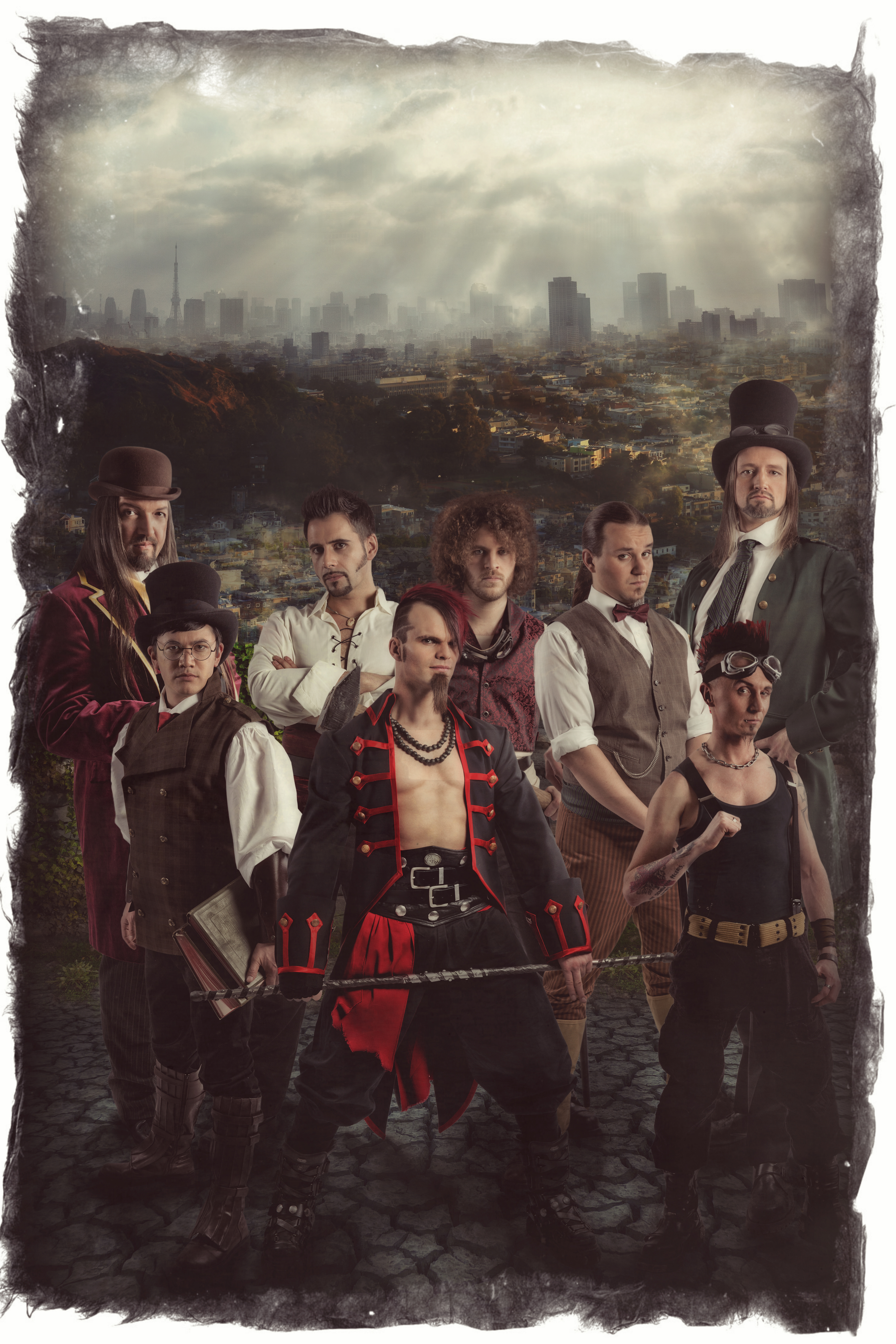 Saltatio Mortis 2013, Foto von Ann Buster